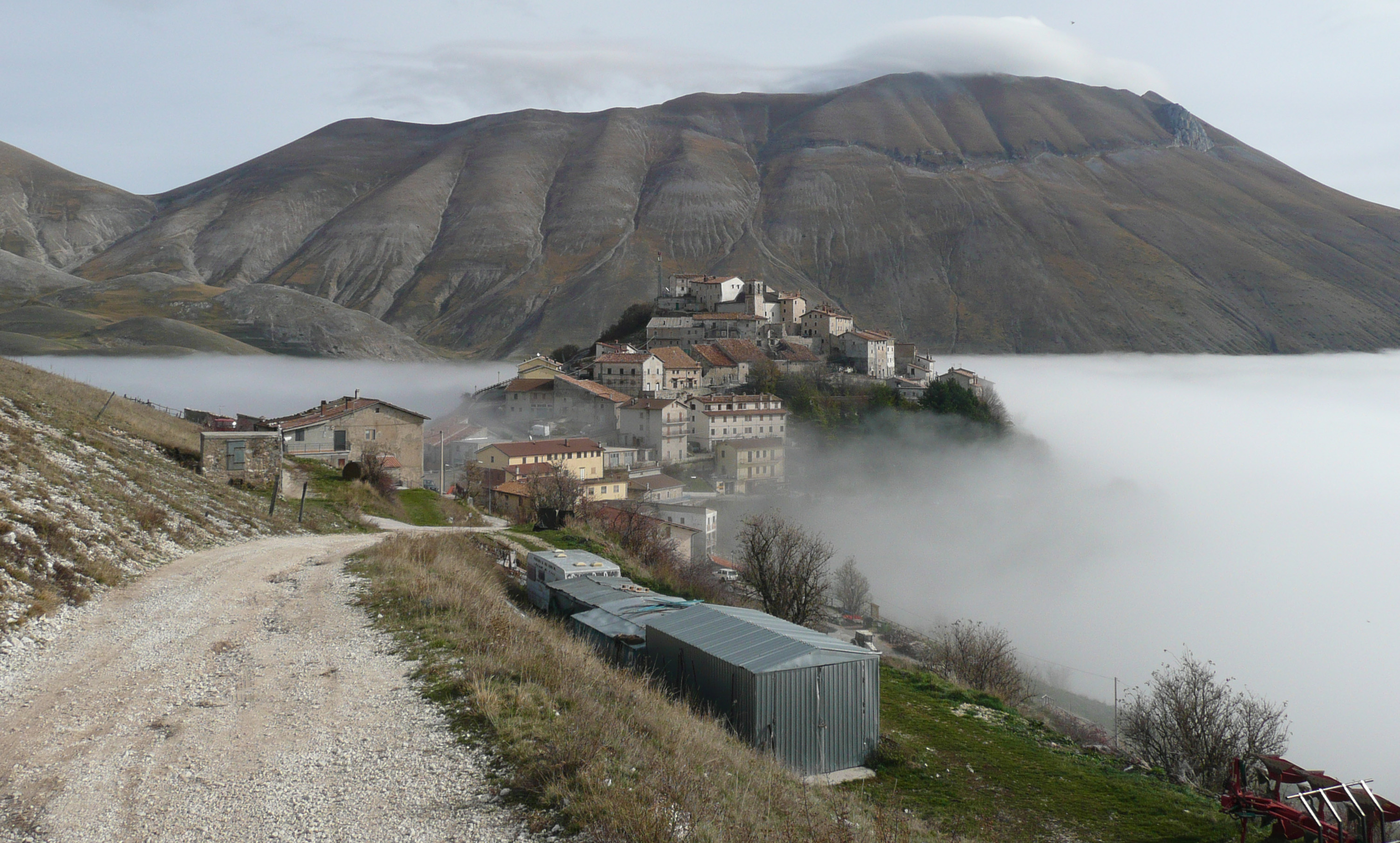 Village Castelluccio (Norcia)